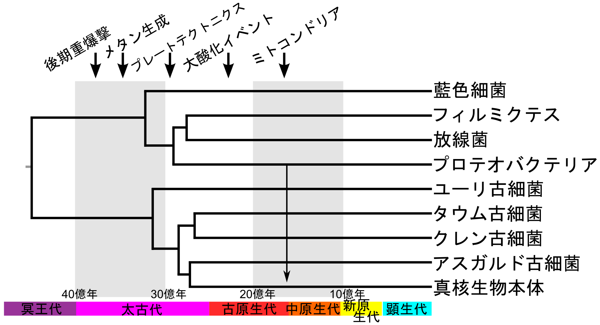 29遺伝子と化石証拠に基づく系統樹 Betts, H. C., et al. (2018). "Integrated genomic and fossil evidence illuminates life's early evolution and eukaryote origin". Nat. Ecol. Evol. 2: 1556–1562. PMID 30127539.